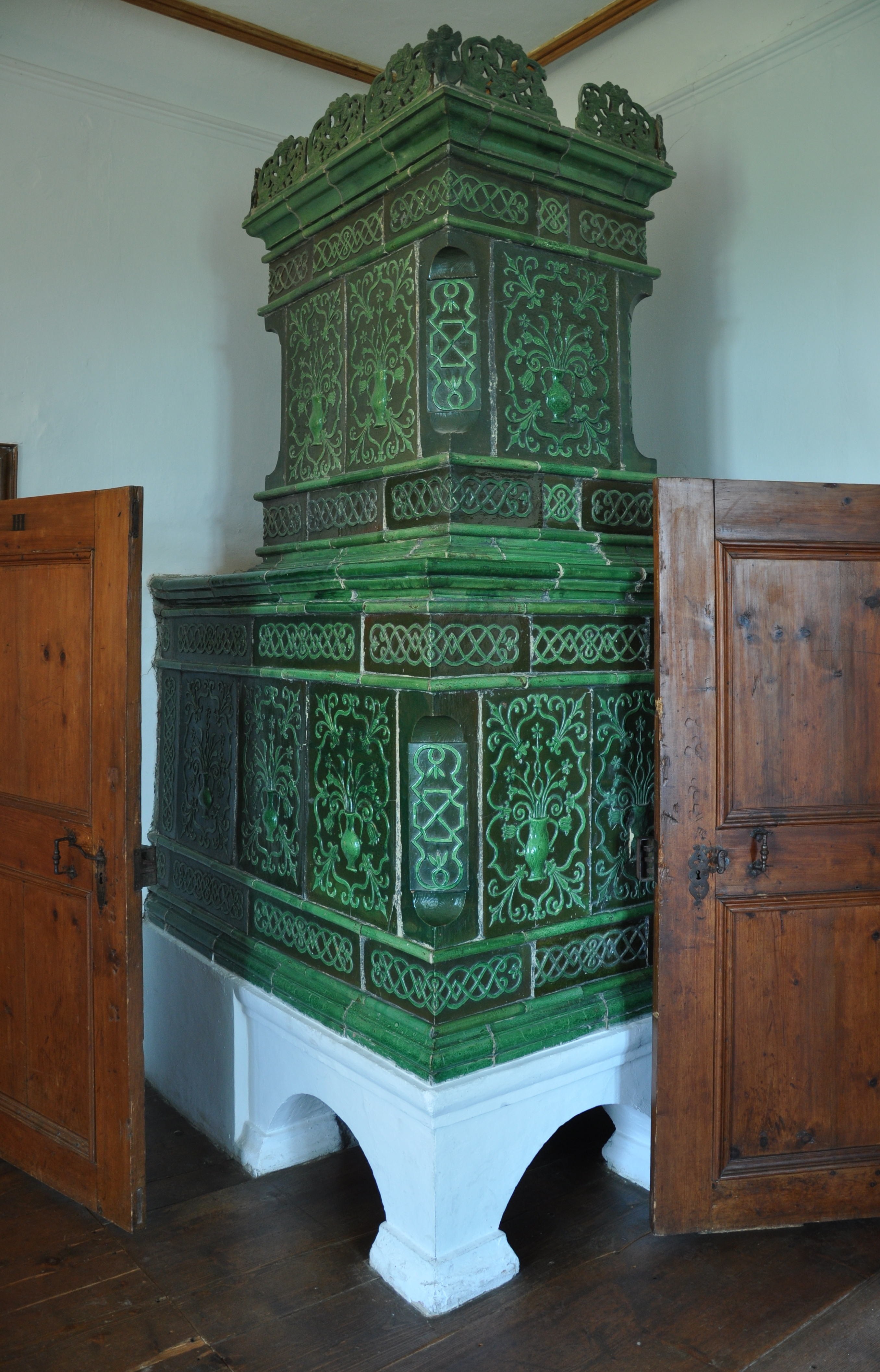 Burg Waldburg (Württemberg), Kachelofen